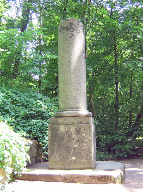 Усечённая колонна.